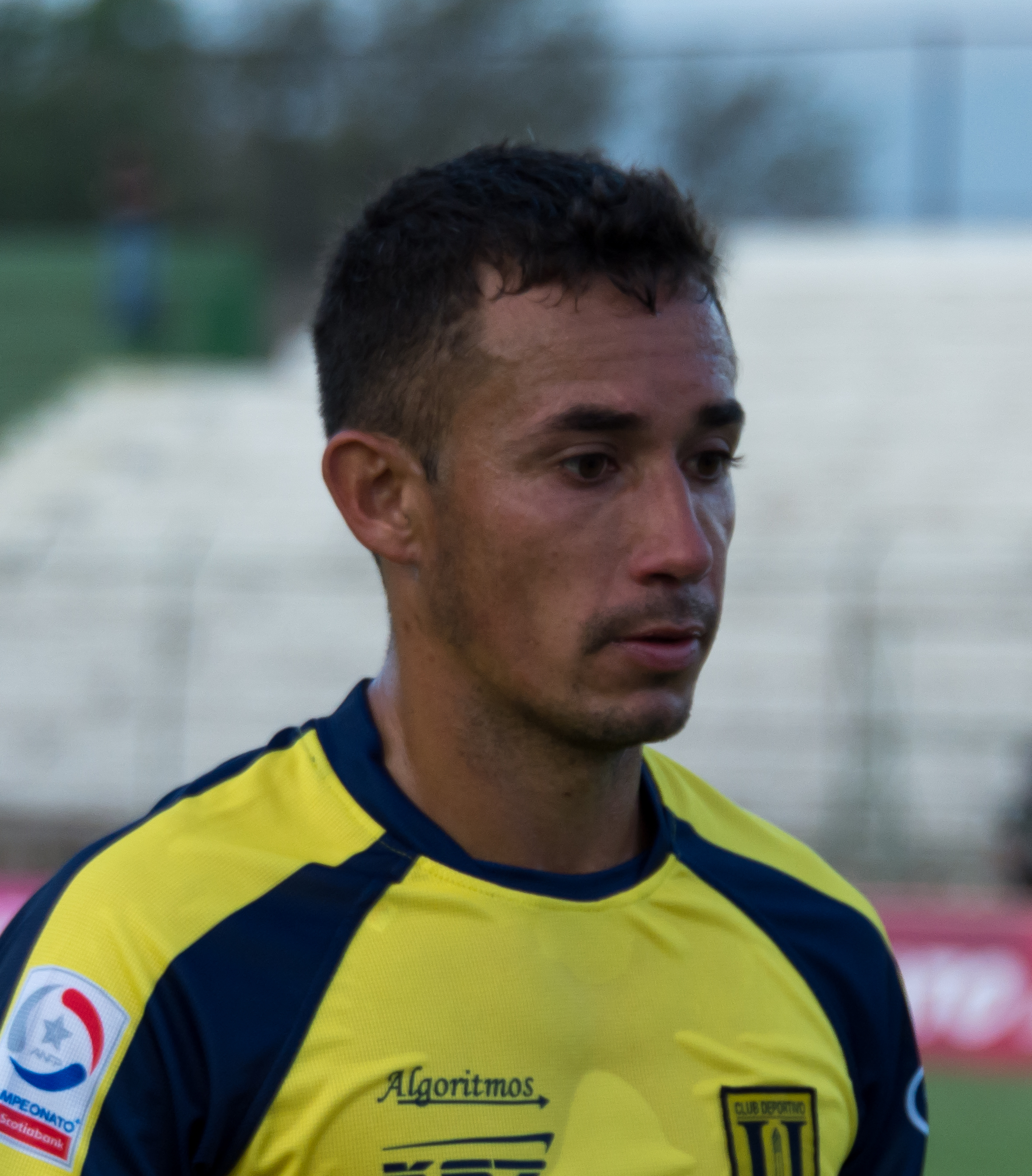 Francisco Portillo, Palestino v Universidad de Concepción, Estadio Municipal de La Cisterna, La Cisterna, Santiago, Región Metropolitana, Chile.